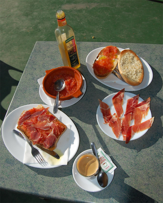 Desayuno de aceite y jamón en la estación de Luque, Córdoba (España)..